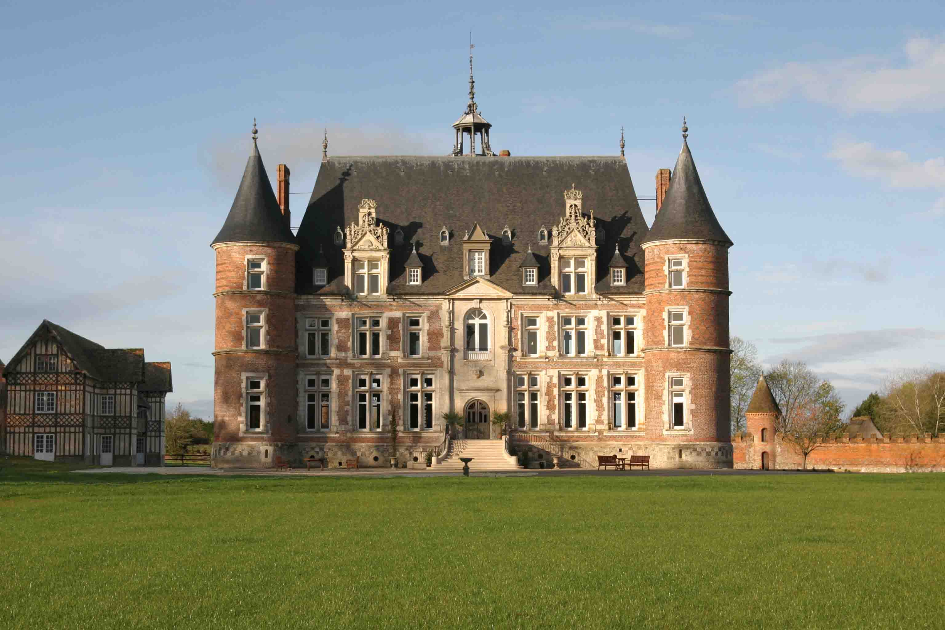 Château de Tilly - Photo de la façade principale après restauration